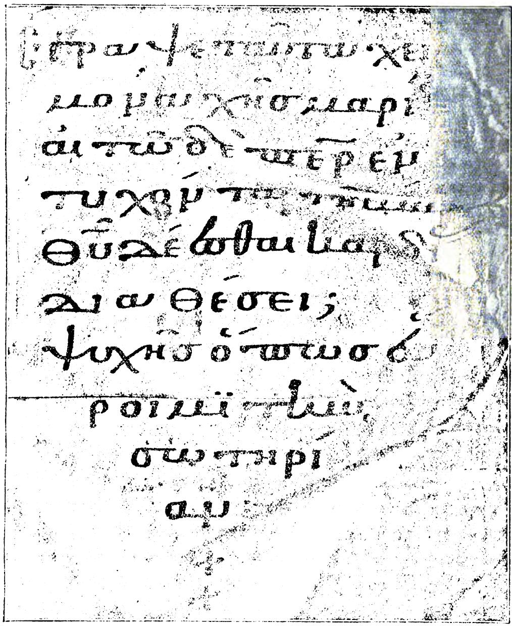 Inschrift in Griechisch